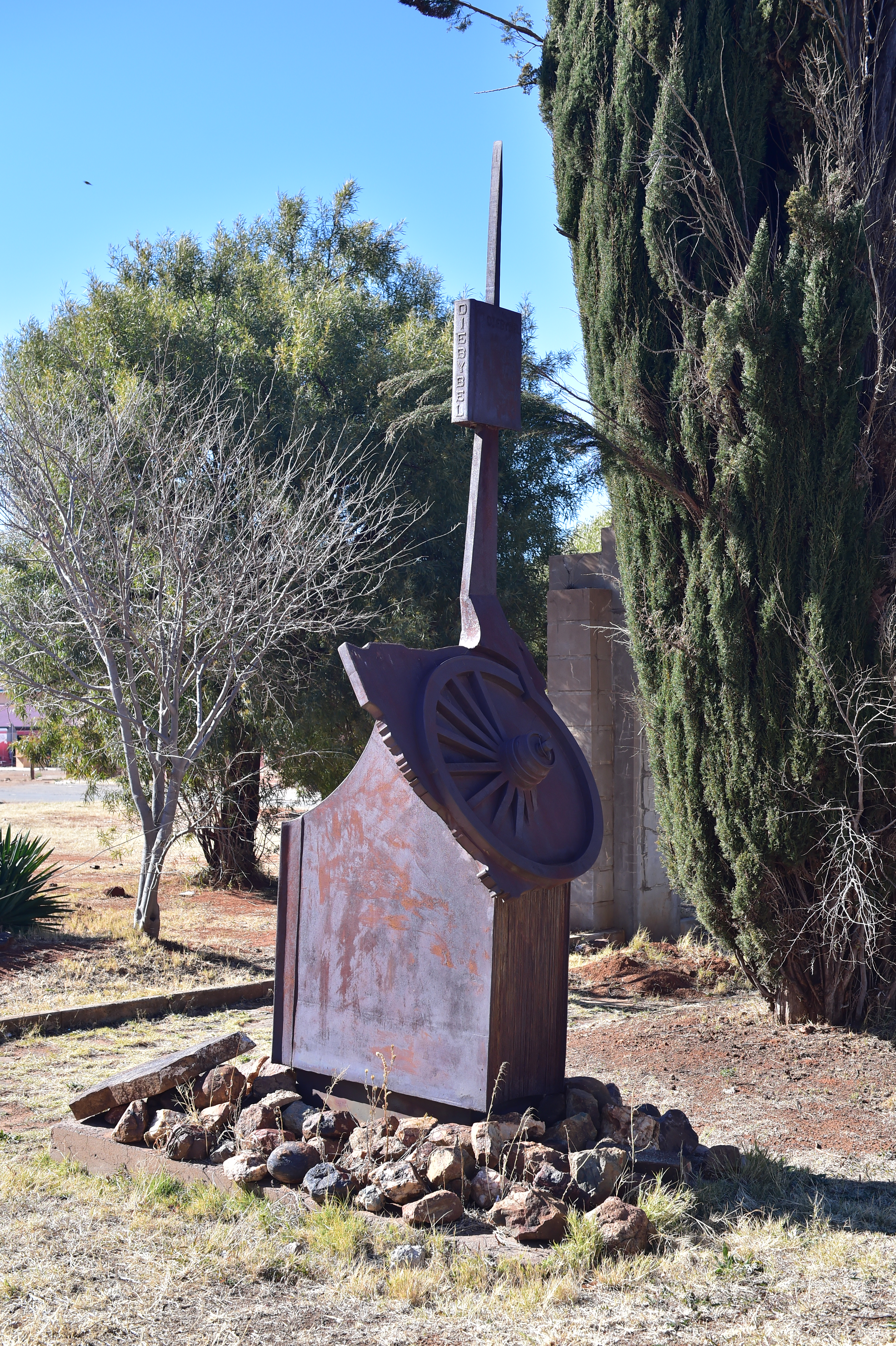 Vue du North West en Afrique du Sud.